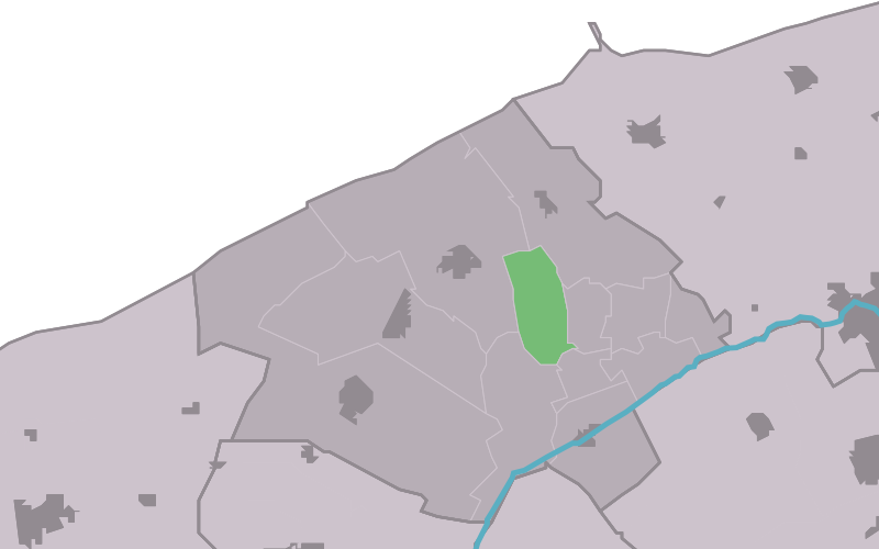 Kaartsje fan himrik fan Hegebeintum